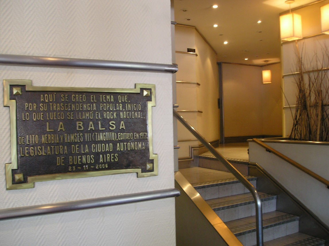 La Perla del Once. Esquina de las avenidas Rivadavia y Jujuy (barrio Once). Buenos Aires. Lugar donde se compuso La Balsa (Litto Nebbia y Tanguito). Placa en la escalera que lleva hacia el baño donde se compuso La Balsa.